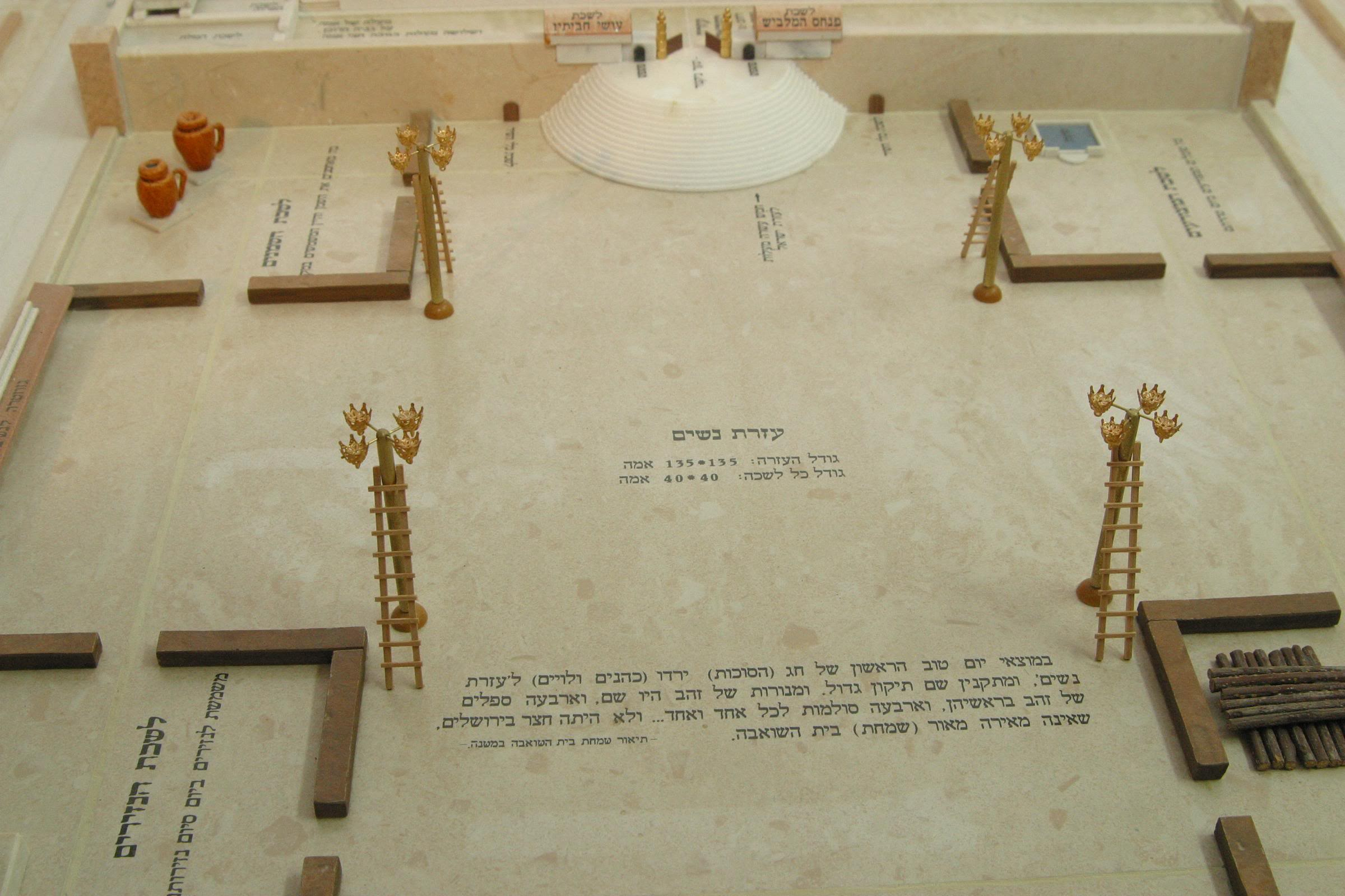 דגם משכן העדות שנוצר על ידי מיכאל אוסניס מקדומים